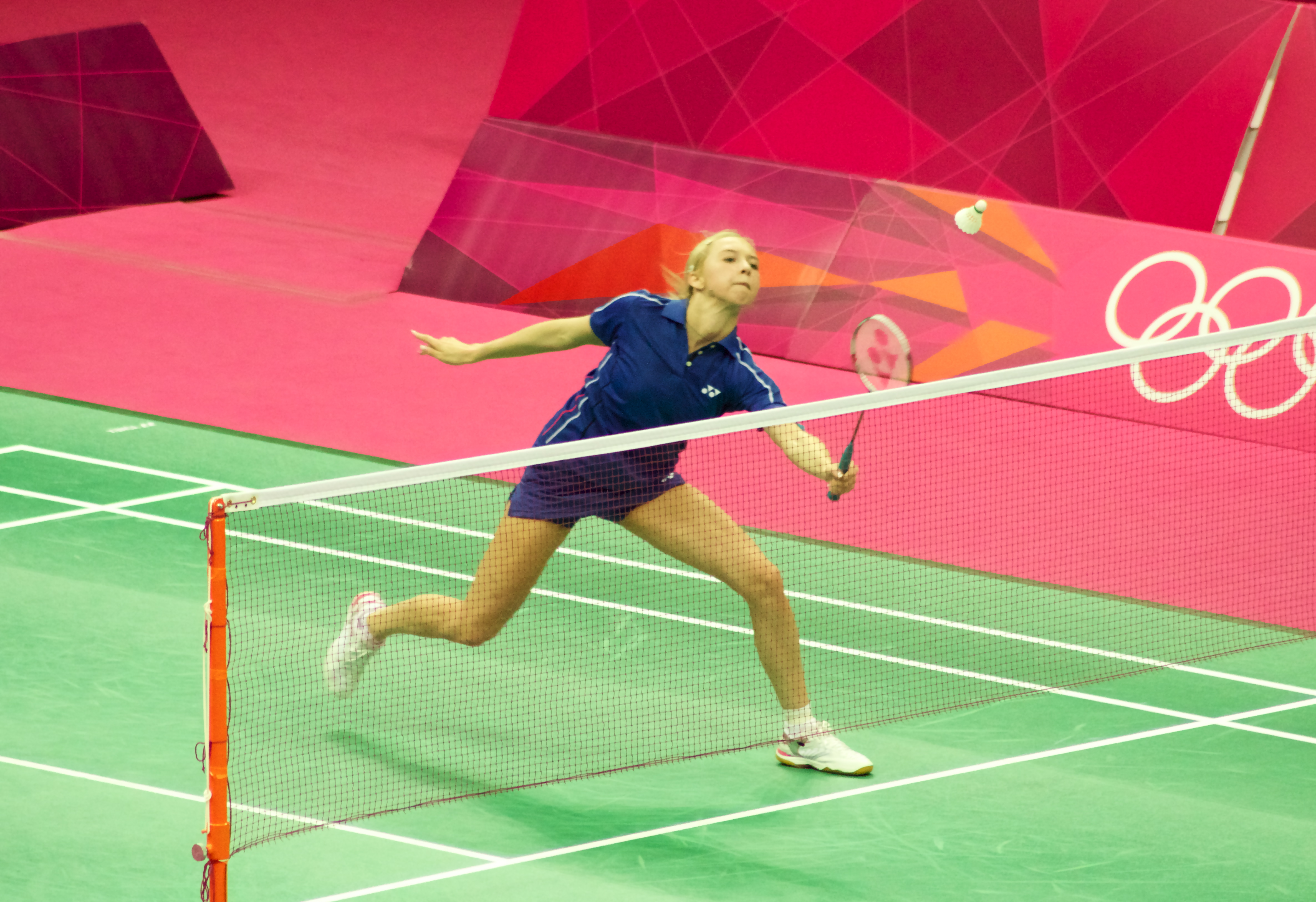 Canon 600d Lens: Tamron 70-300mm